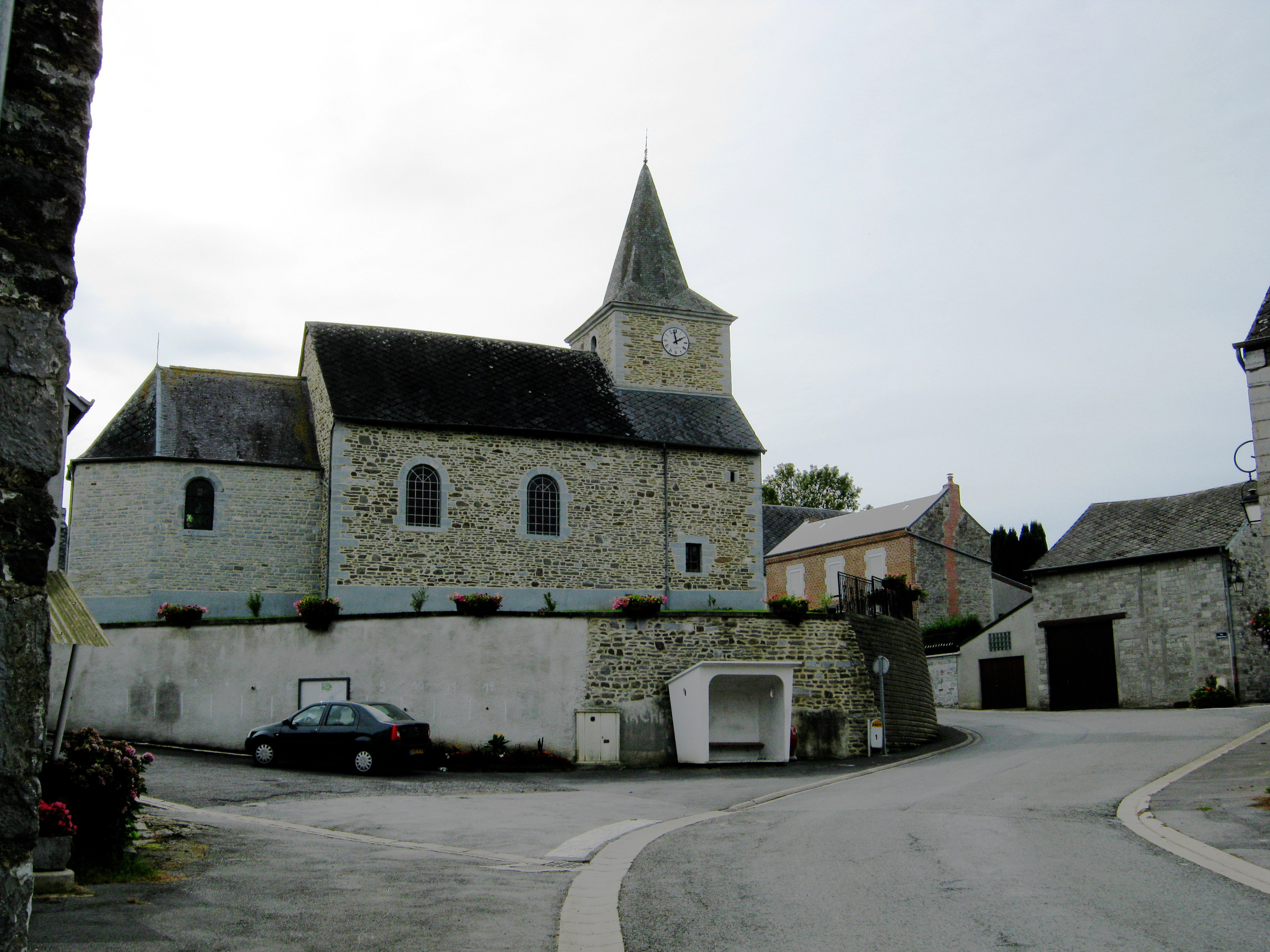 Ham sur Meuse